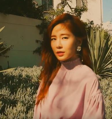 청명한 하늘빛이 눈부시던 LA에서 유인나를 마주했다. LA의 맑은 하늘을 닮은 유인나의 어느 멋진 날.